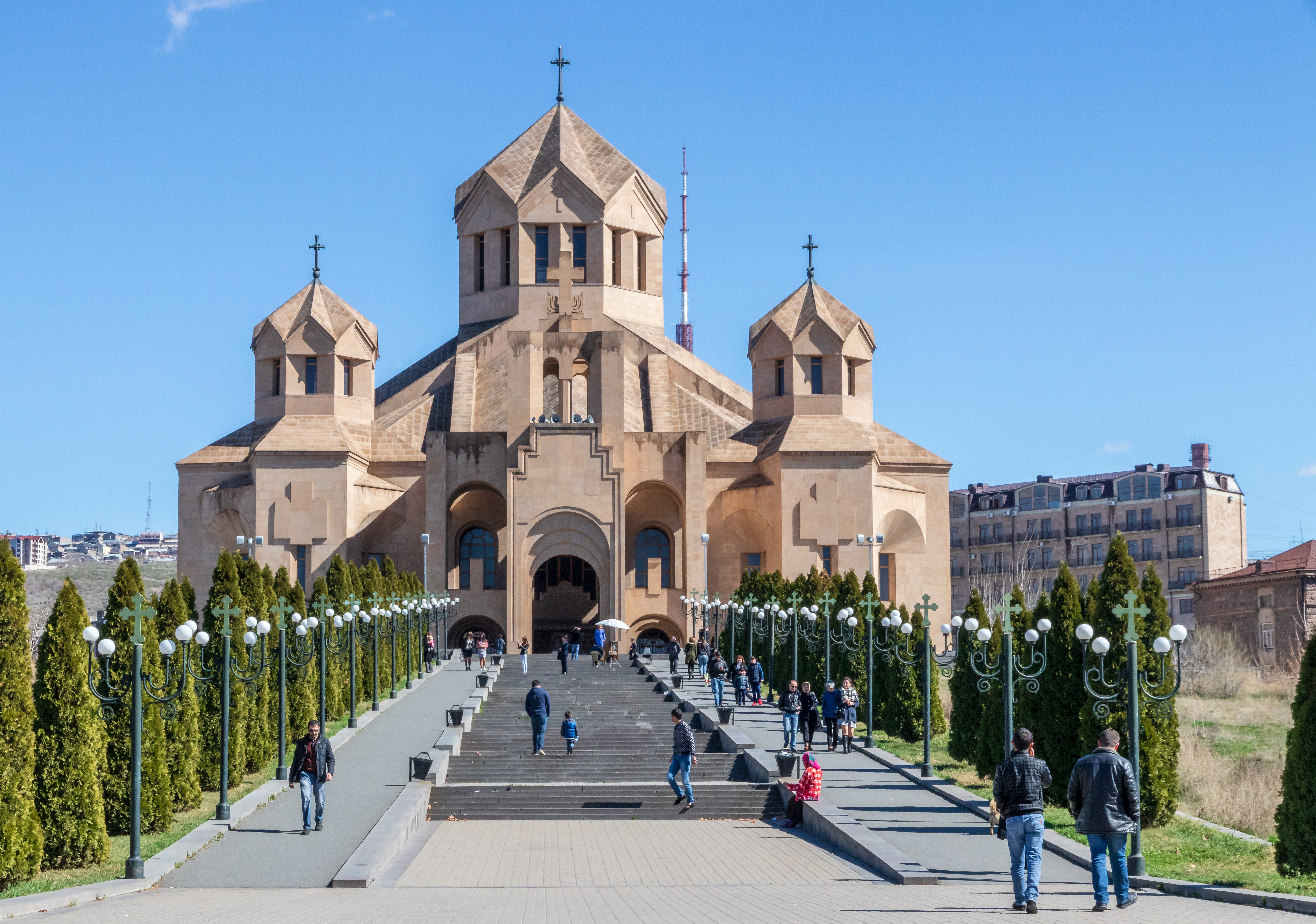 Cathedral of Yerevan